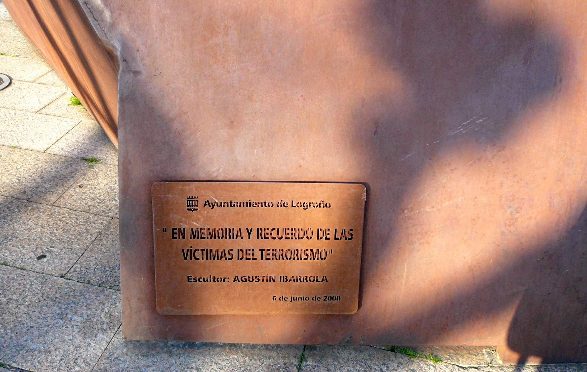 Memorial de las víctimas del terrorismo (obra de Agustín Ibarrola), en Logroño